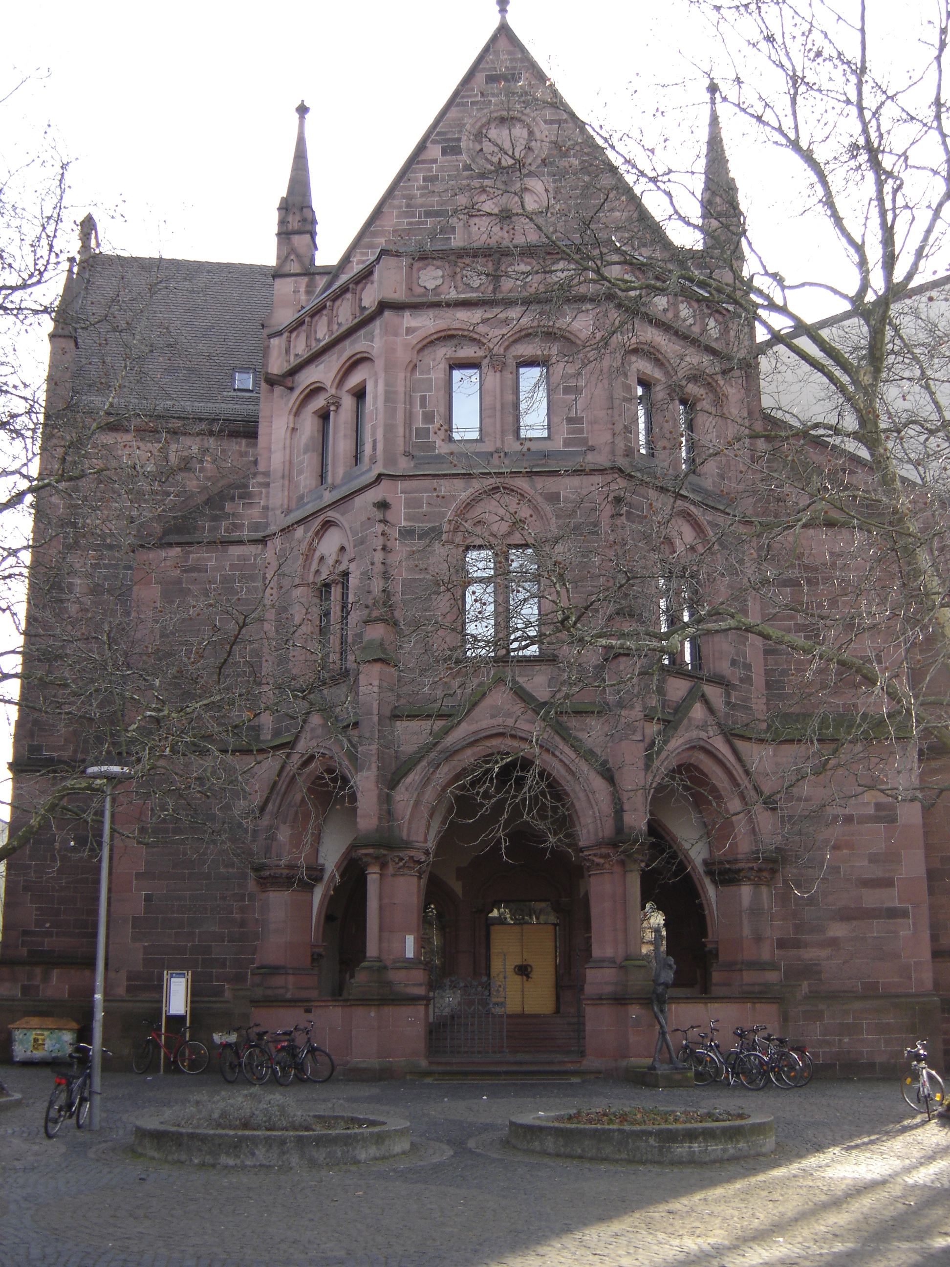 Das Kollegiengebäude IV / KGIV